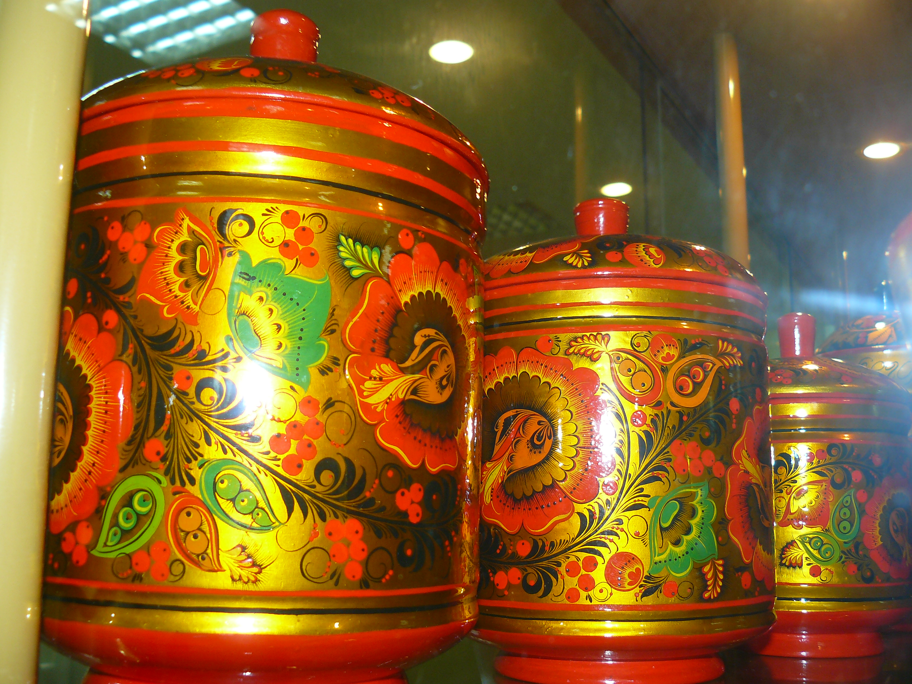 Набор поставков, автор росписи - Отвагина Юлия, 1996 год, Семенов.